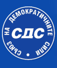 Logo der bulgarische Partei Union der Demokratischen Kräfte (/Sajus na Demokratitschni Sili, kurz CДC/SDS)